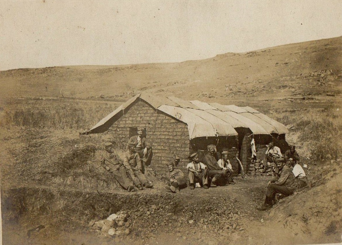 Podmol, Macedonia